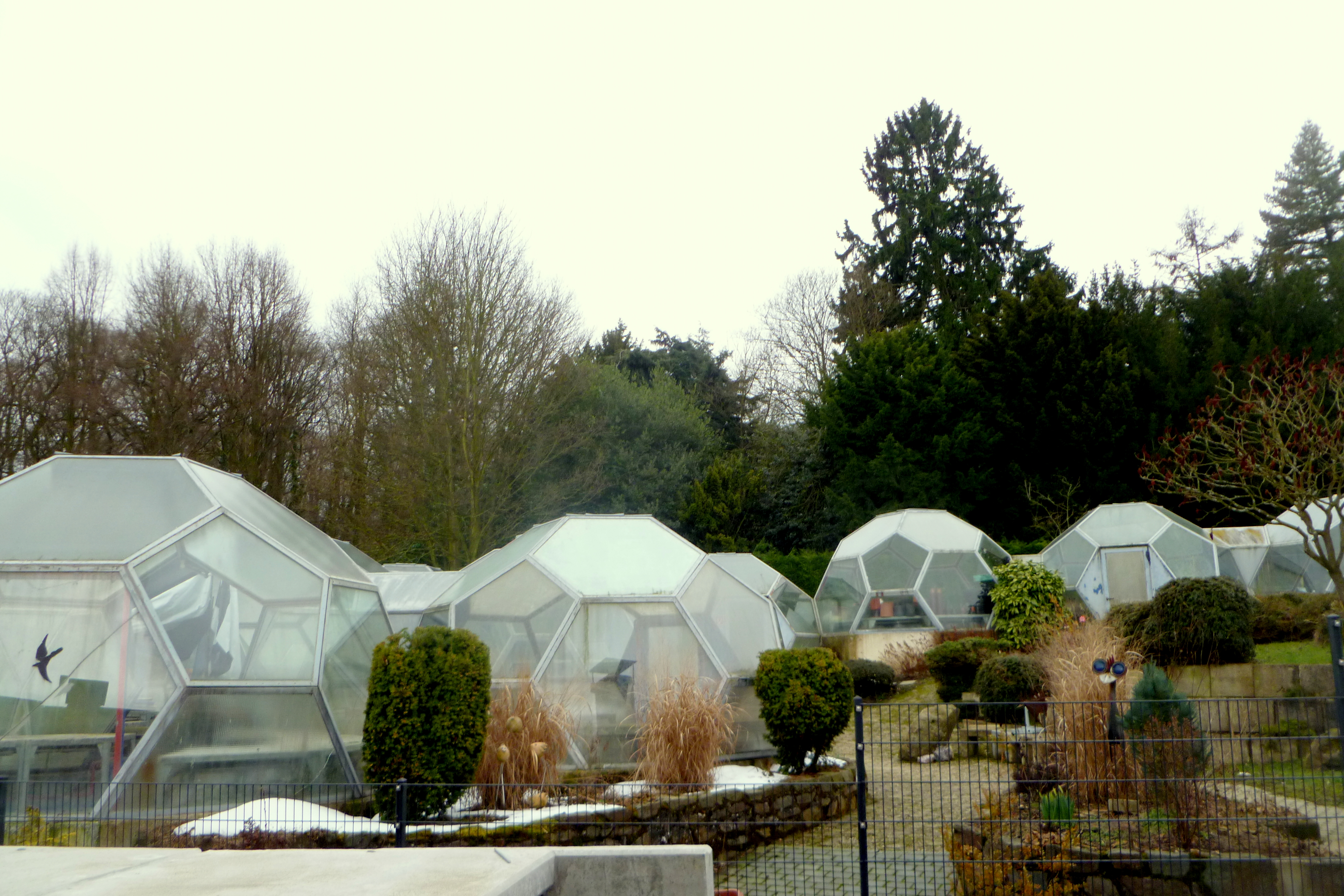 Gewächshäuser Müschpark Aachen